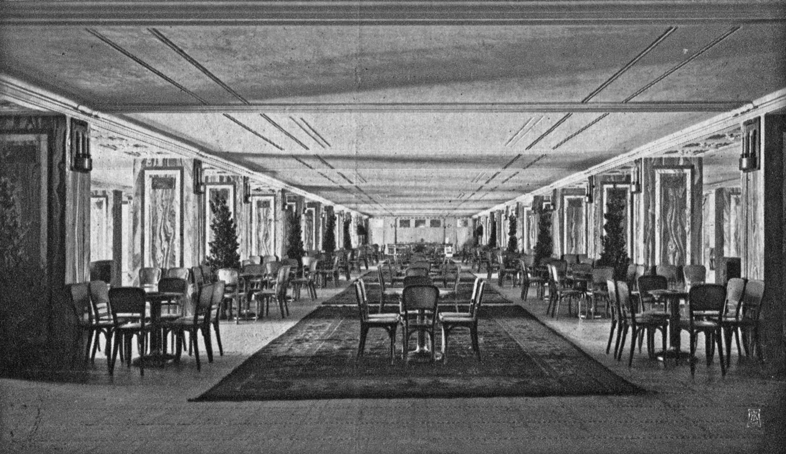 Berlin - Weinhaus Rheingold, Café im Garderobenvestibül